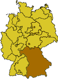 selbst erstellt, GNU-FDL